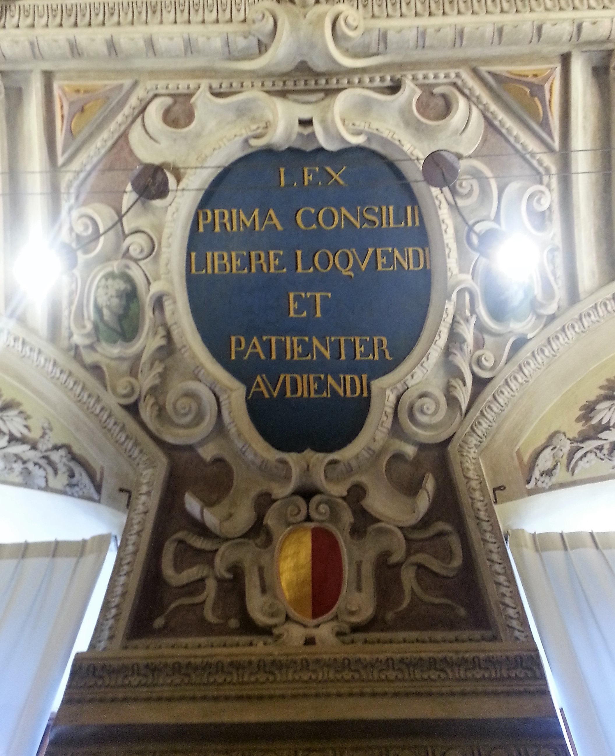 stemma del comune di Bergamo con il cartiglio che riporta la prima regola del Minor Consiglio dei 12